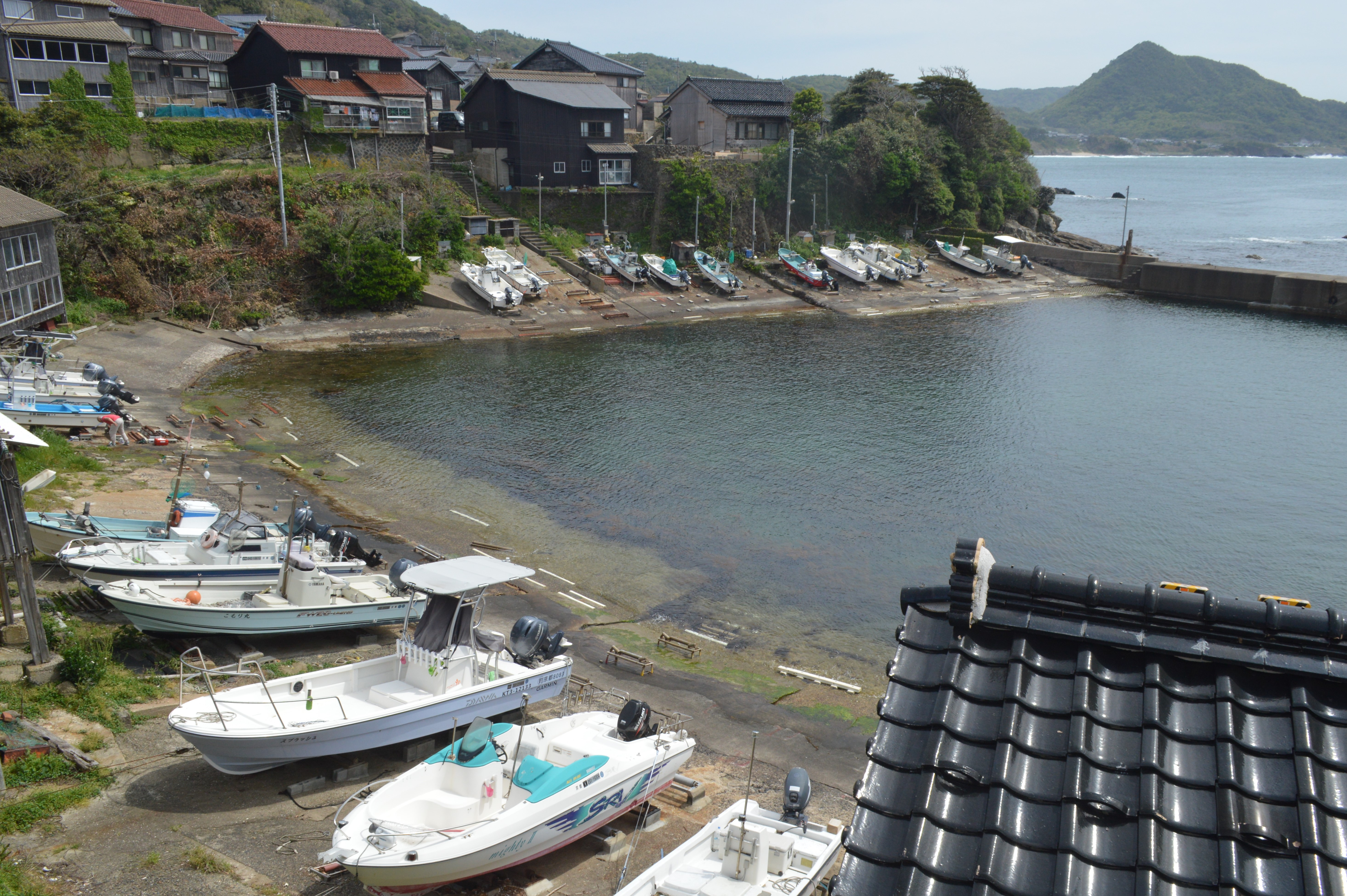 京都府京丹後市丹後町間人にある小間漁港。